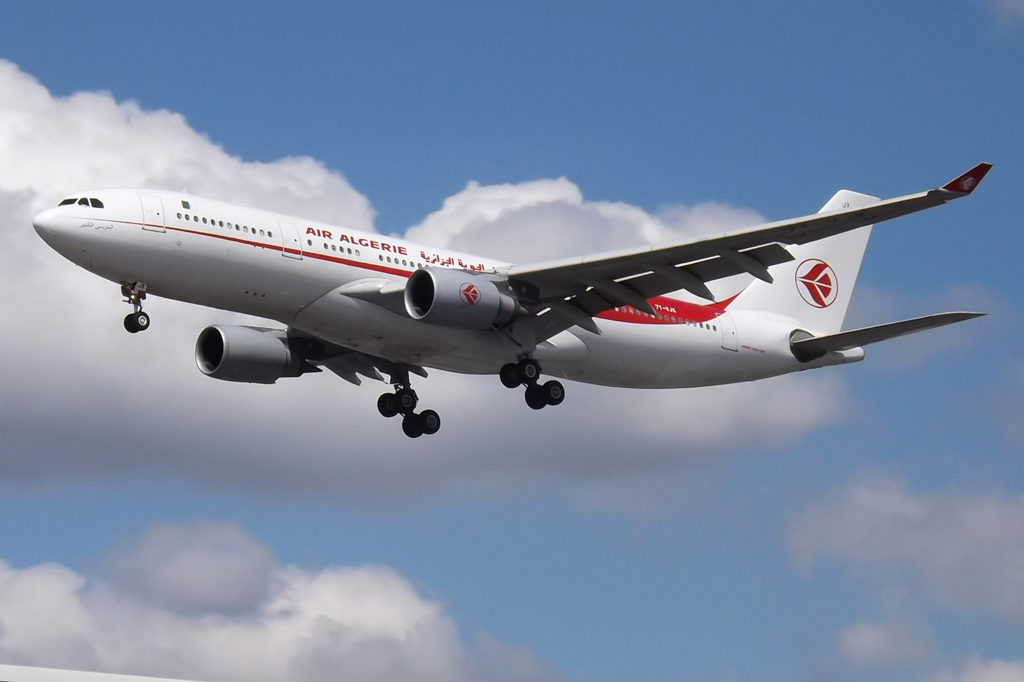 7T-VJX A330 Air Algerie